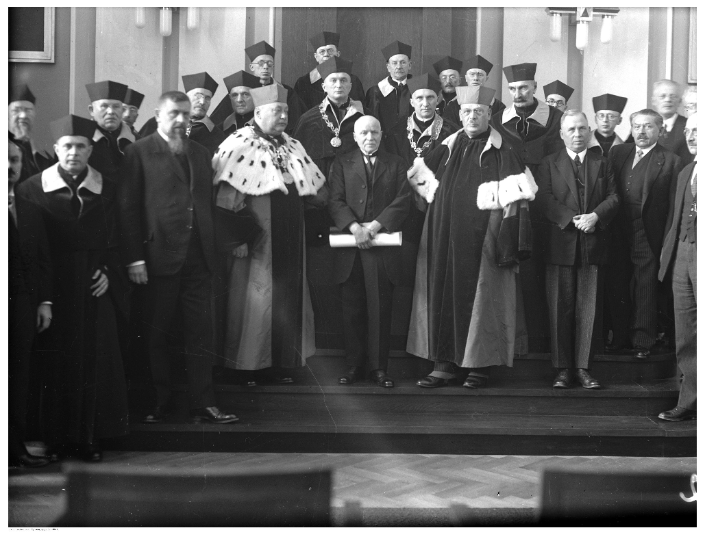 Снимка от честването на 50 години научна работа на проф. Карол Бохданович, Минно-металургична академия в Краков.